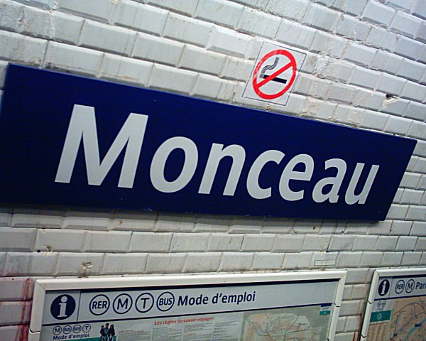 Plaque de la station Monceau du Métropolitain de Paris.